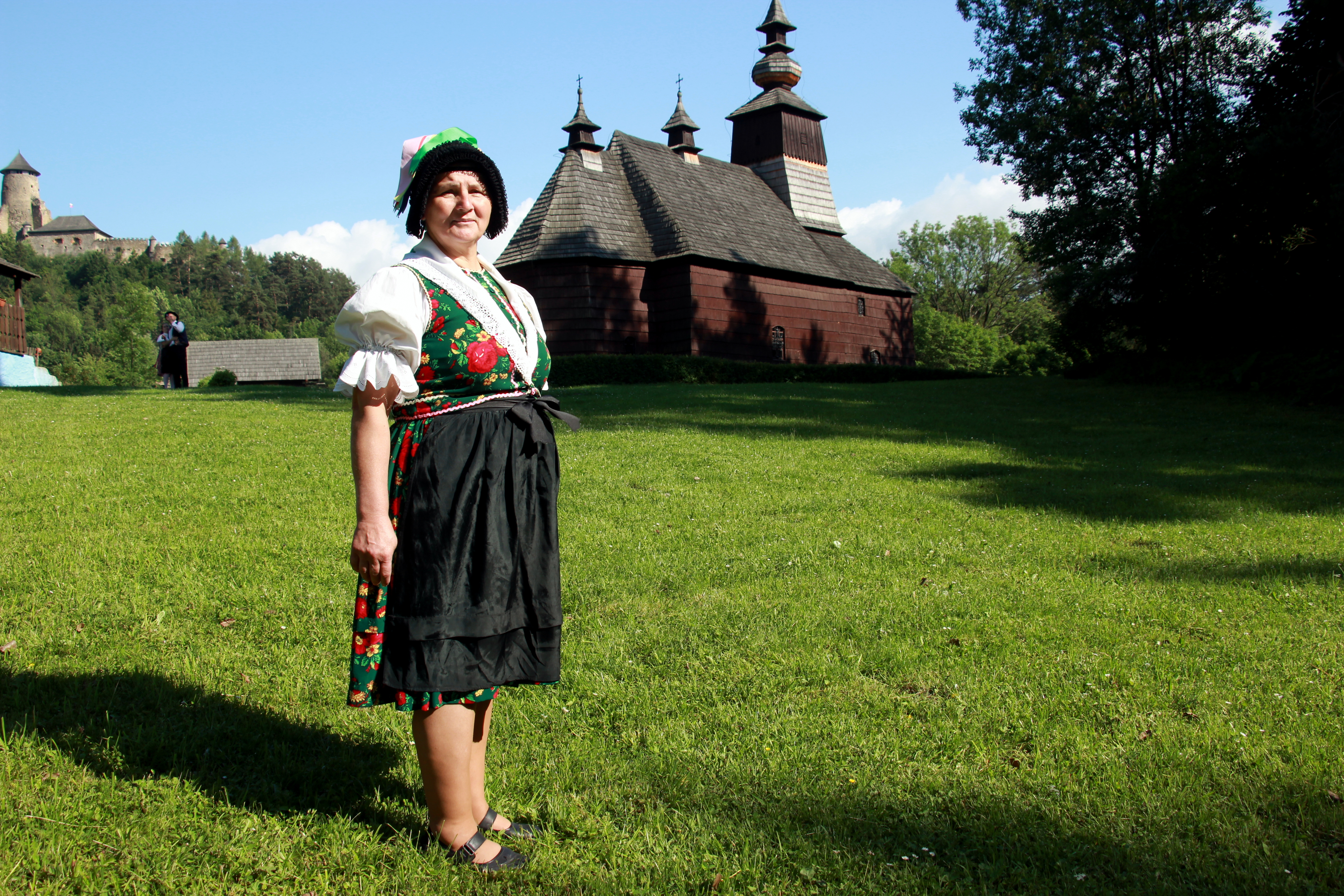 Strój kobiecy mniejszości niemieckiej w Chmielnicy na Słowacji.